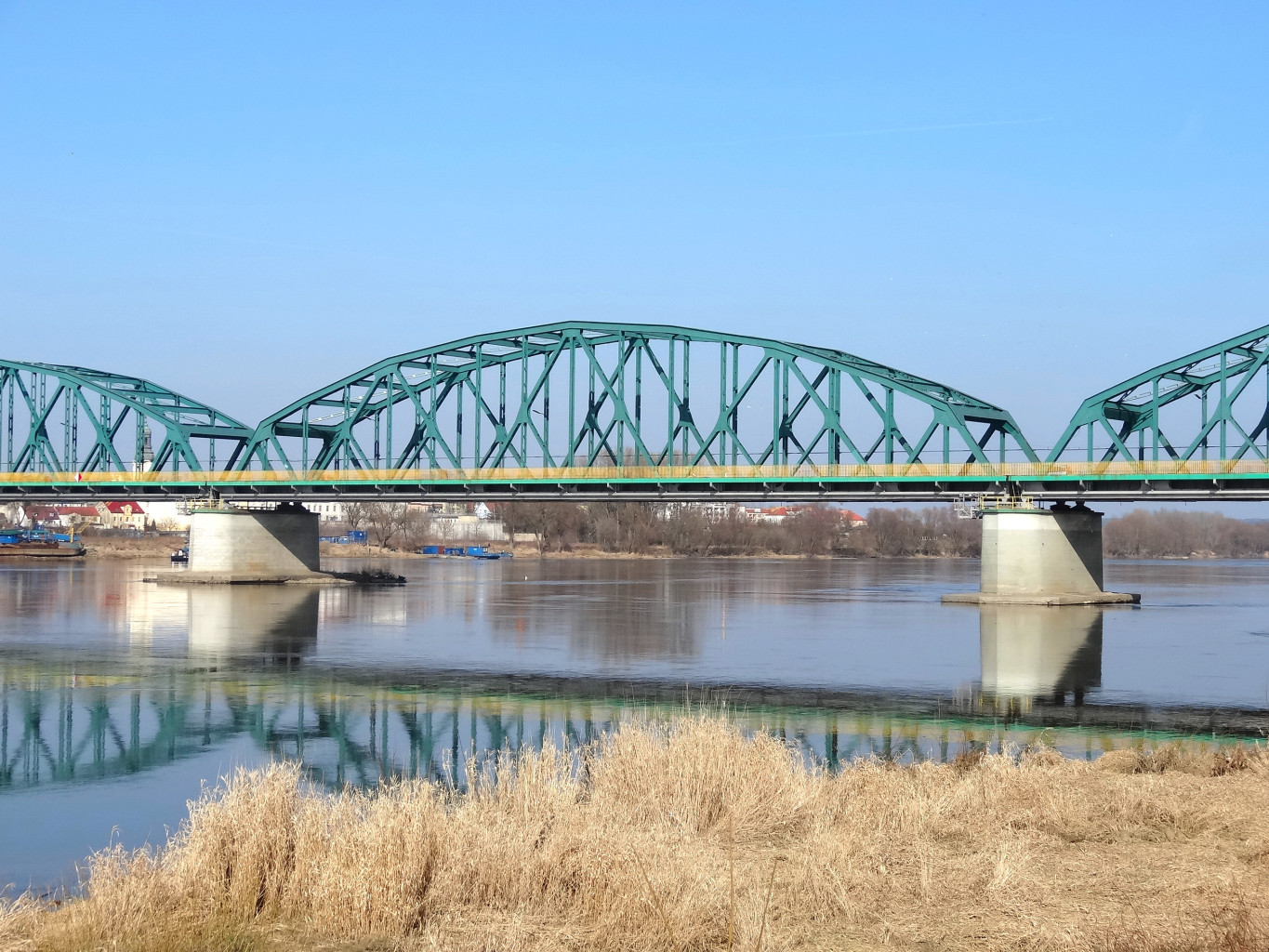 Most Fordoński im. Rudolfa Modrzejewskiego nad Wisłą w Bydgoszczy-Fordonie